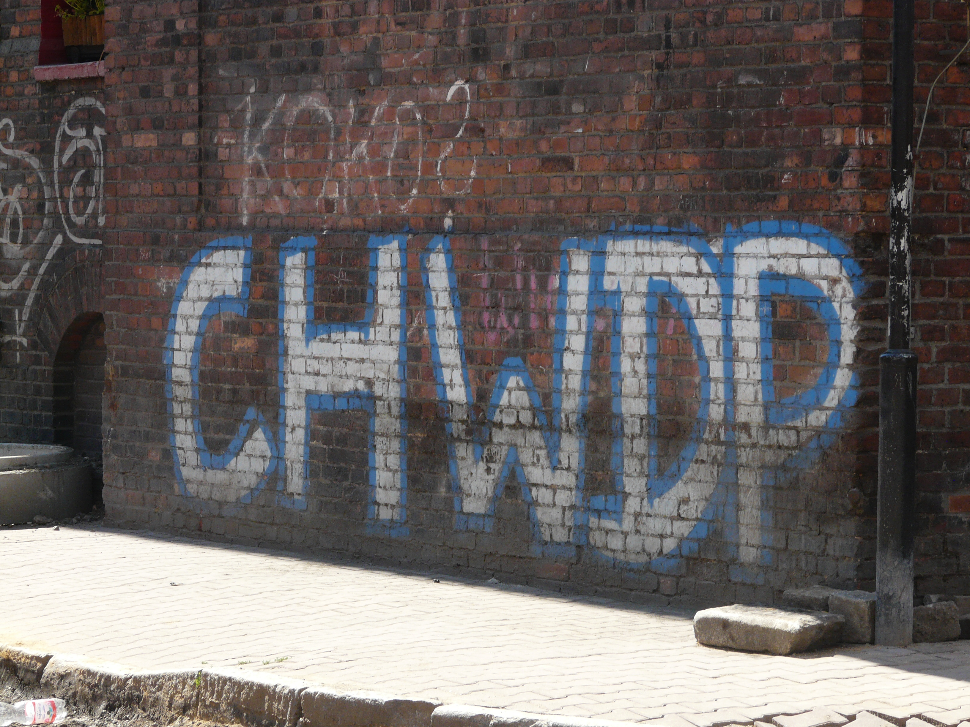 Katowice, Nikiszowiec